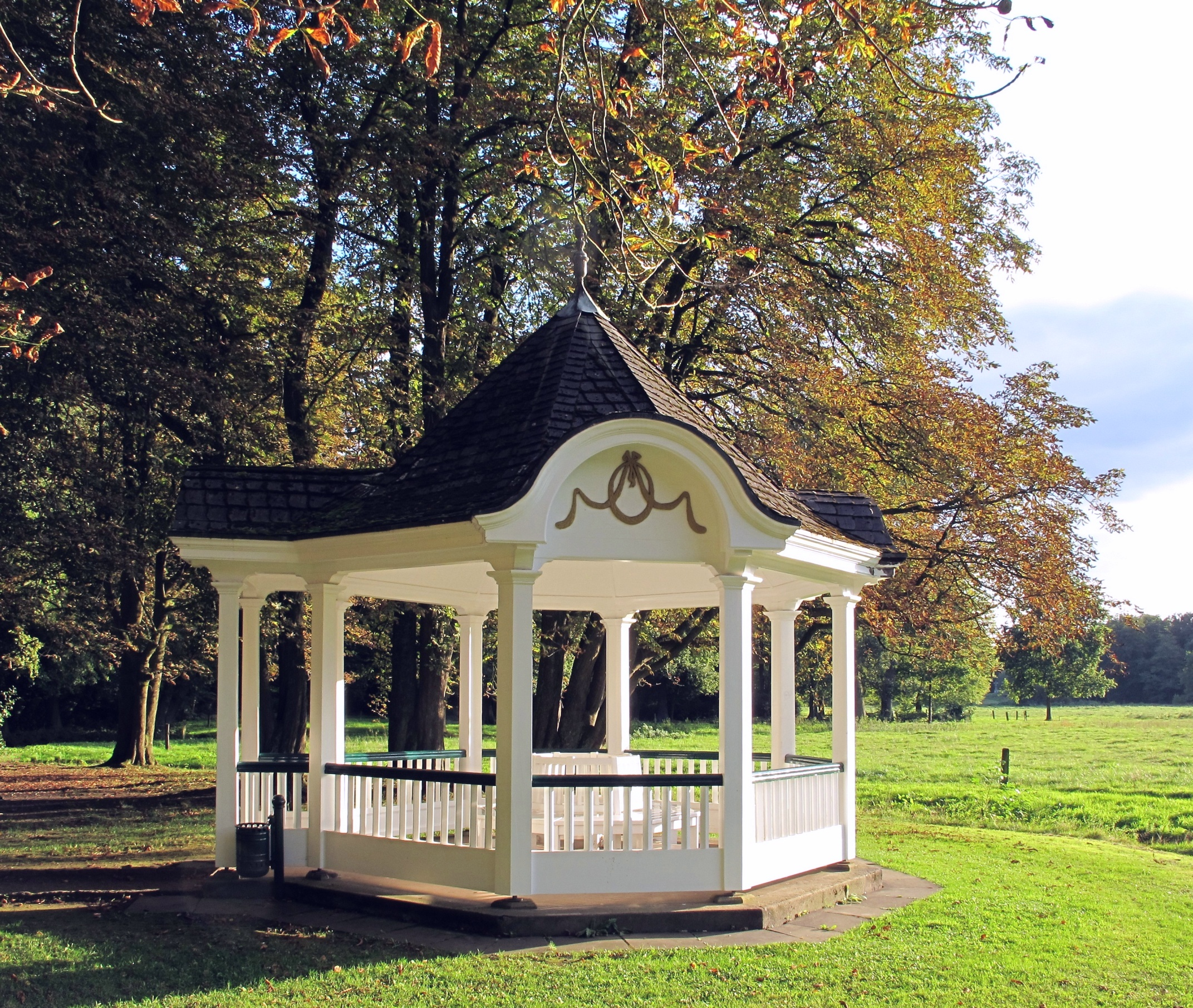 Gerdespavillon in Bremen,Das abgebildete Objekt ist ein geschütztes Kulturdenkmal in der Freien Hansestadt Bremen, mit der Nr. 0218,T034 beim Landesamt für Denkmalpflege registriert.